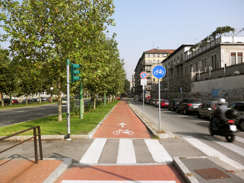 Pista ciclabile in viale Mugello a Milano.